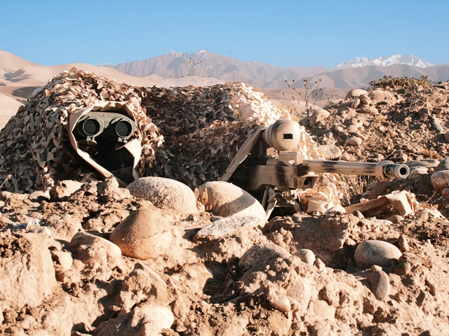 Scharfschützen agieren meist zu zweit